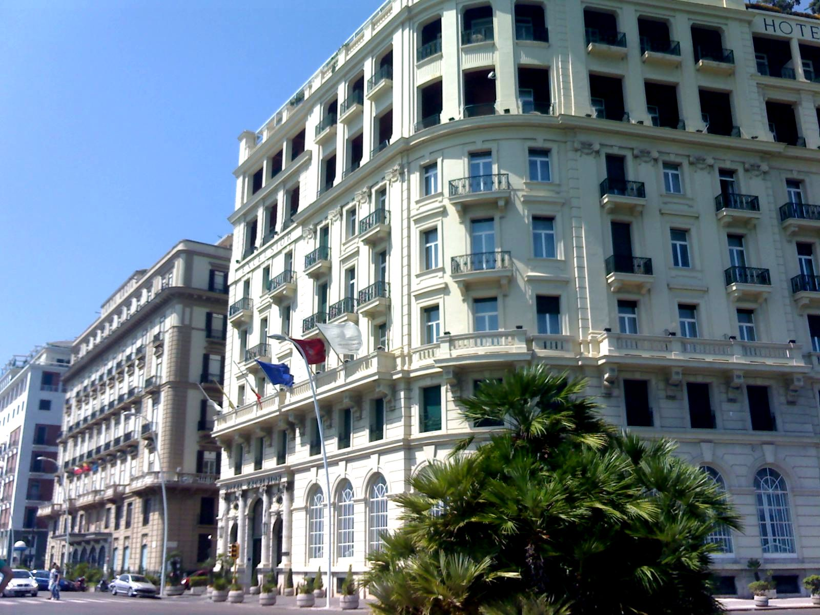 Mergellina (Napoli). L'hotel Excelsior.